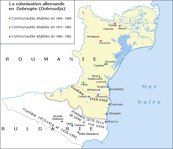 Les colonies allemandes en Dobrogée (Dobroudja), traduit en français et adapté d'après la version roumaine d'Asybaris01.